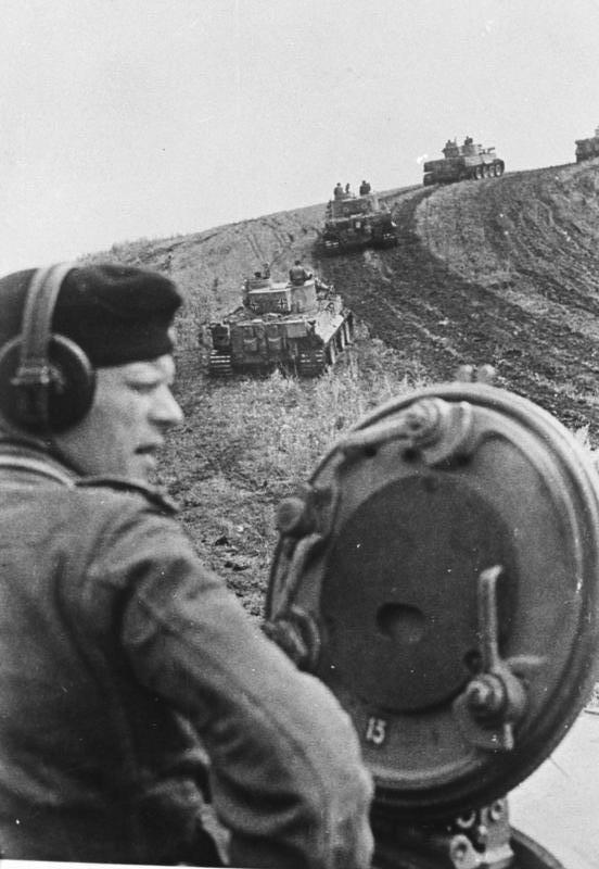 61302 Mit dem Tiger gegen den Feind. Mit gleichmässigem Dröhnen der Motoren wird eine Anhöhe im Kampfraum Bjelgorod genommen. 13-8-43 PK.-Aufn.: Kriegsber. Lohse HH. German Armor takes over a Hill in the Combat Area of Bjelogorod. Russia. 8.13.1943 Information added by Wikimedia users.Schwere Panzer-Abteilung 503 (only unit ever near Belgorod)[1]